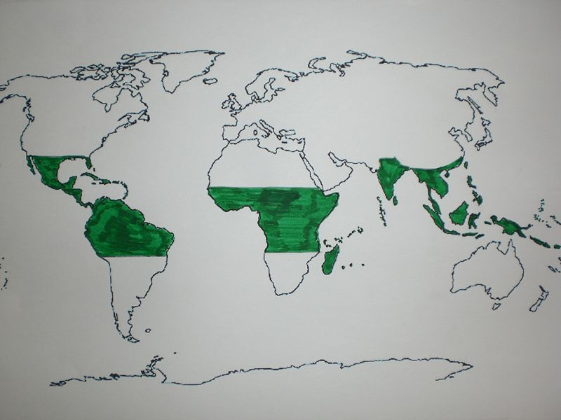 Sono l'autore del disegno e della foto